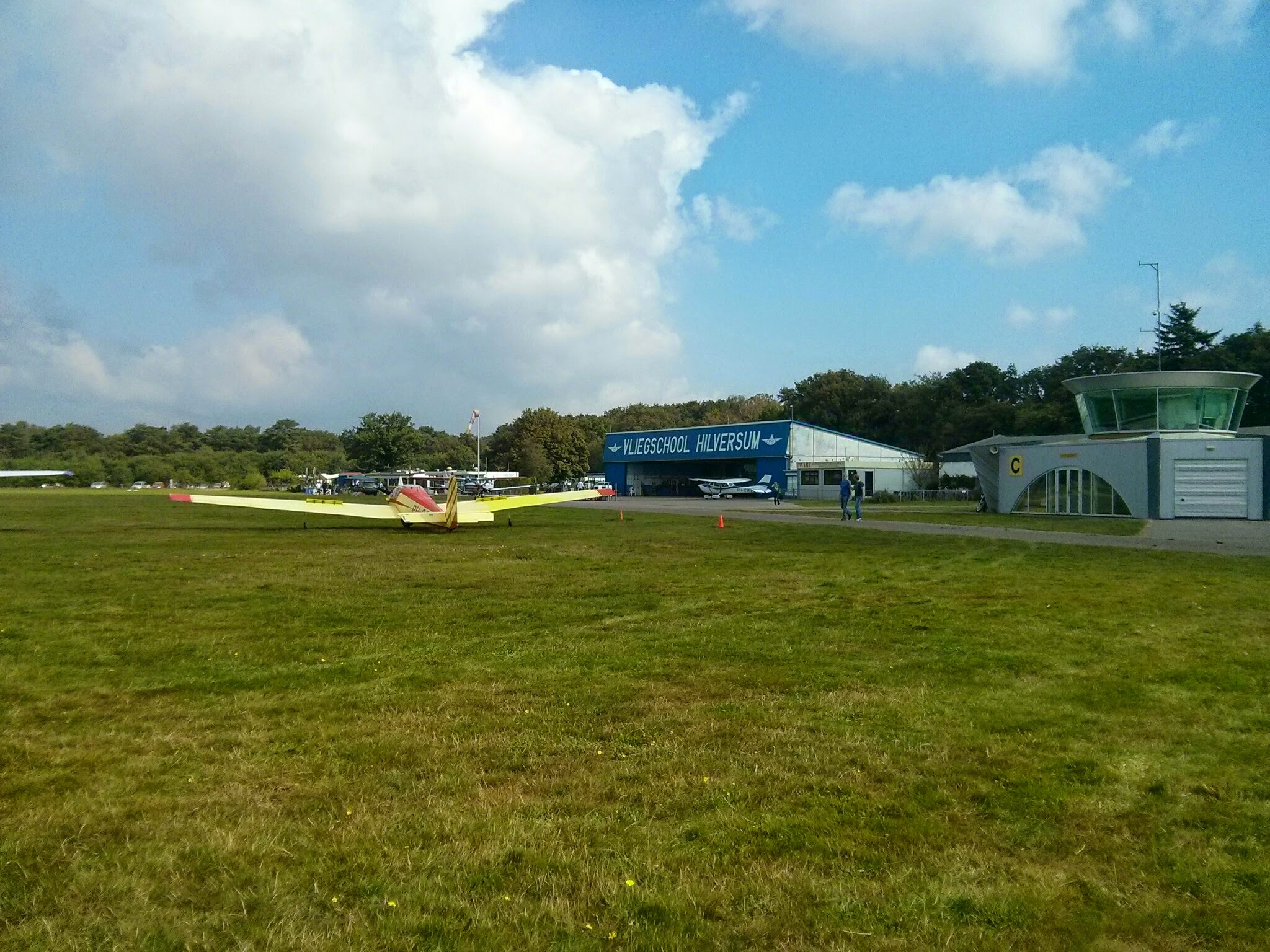 Aerodromo de hilversum